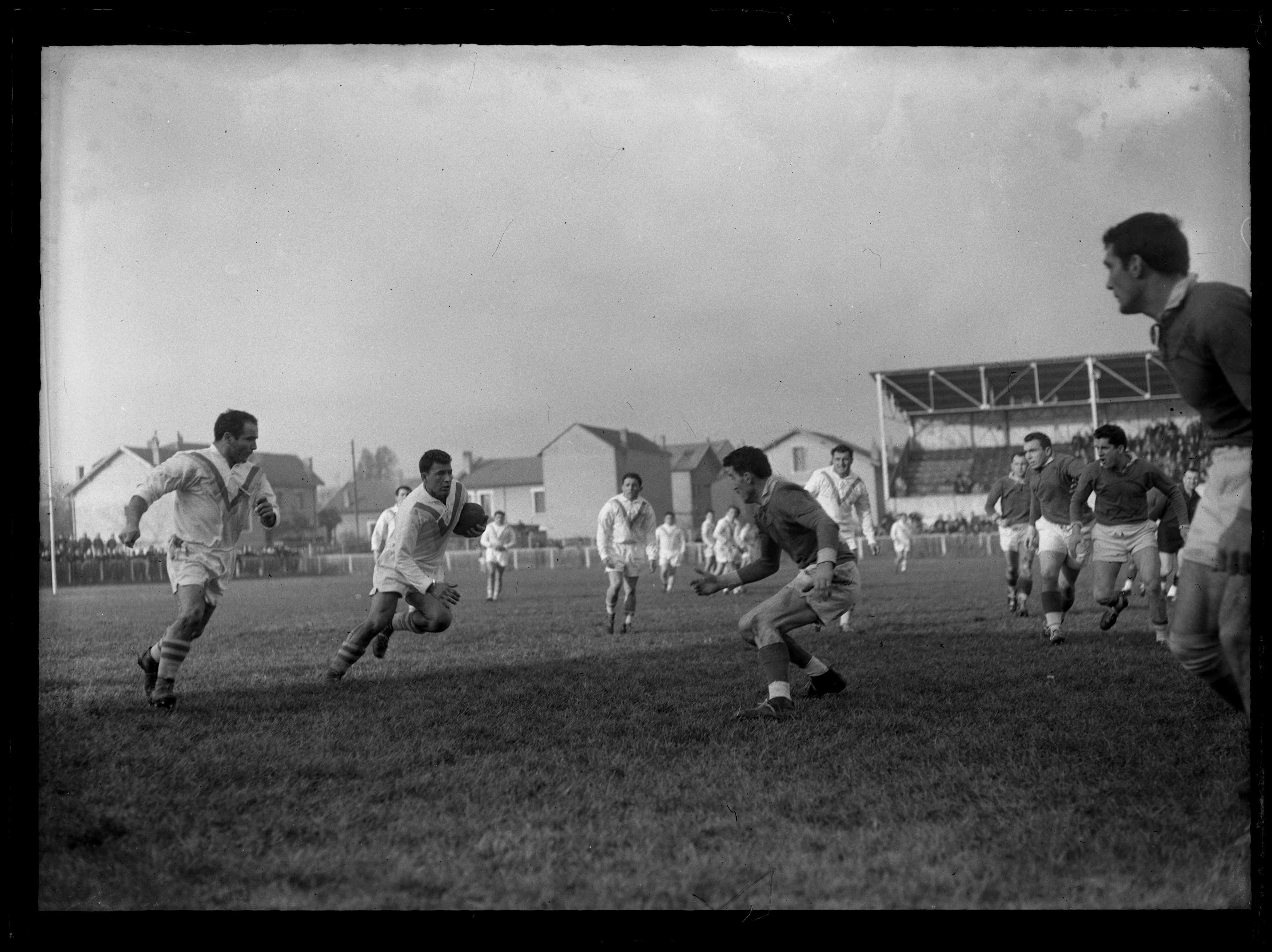 Stade Arnauné (Stade des Minimes), rue Frédéric Estèbe. 22 décembre 1957. Equipe du Toulouse Olympique XIII (rugby à XIII) rencontre l'équipe de Perpignan (XIII Catalan). Cliché pris durant le match ; au 1er plan action de jeu ; en arrière plan tribune du stade.